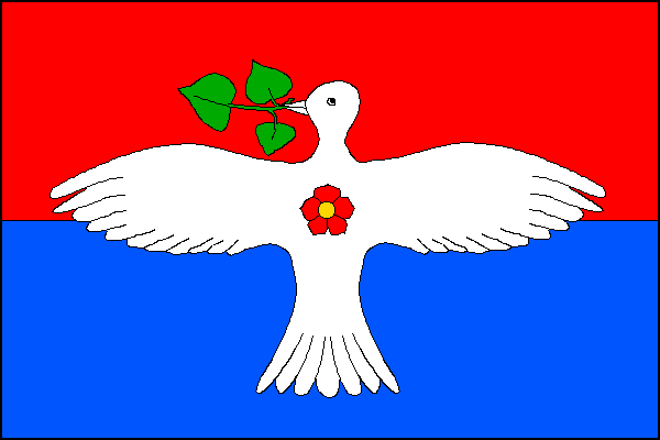 Prapor obce Růžďka